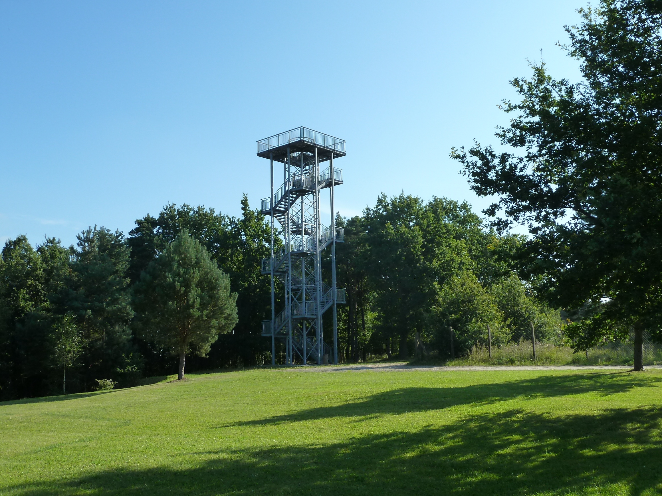 Aussichtsturm auf dem Wanzeberg bei Karenz, Mecklenburg